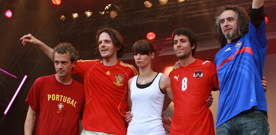 Christina Stürmer & Band nach ihrem Konzert zur Eröffnung der Fußball-Europameisterschaft 2008 in Wien.